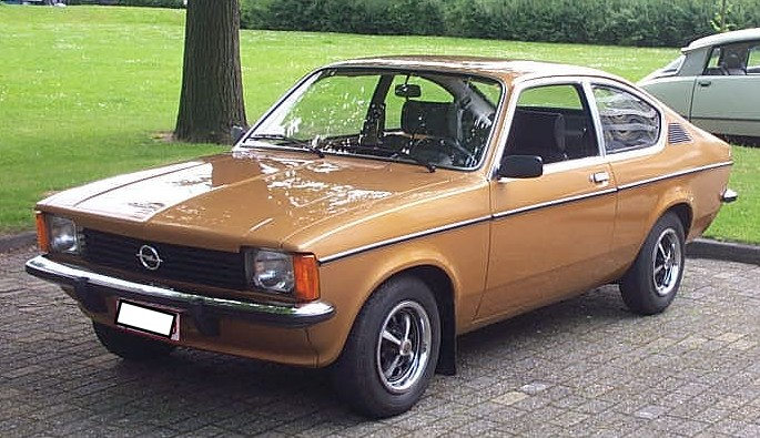 Opel Kadett C Coupé 1.2S 1978